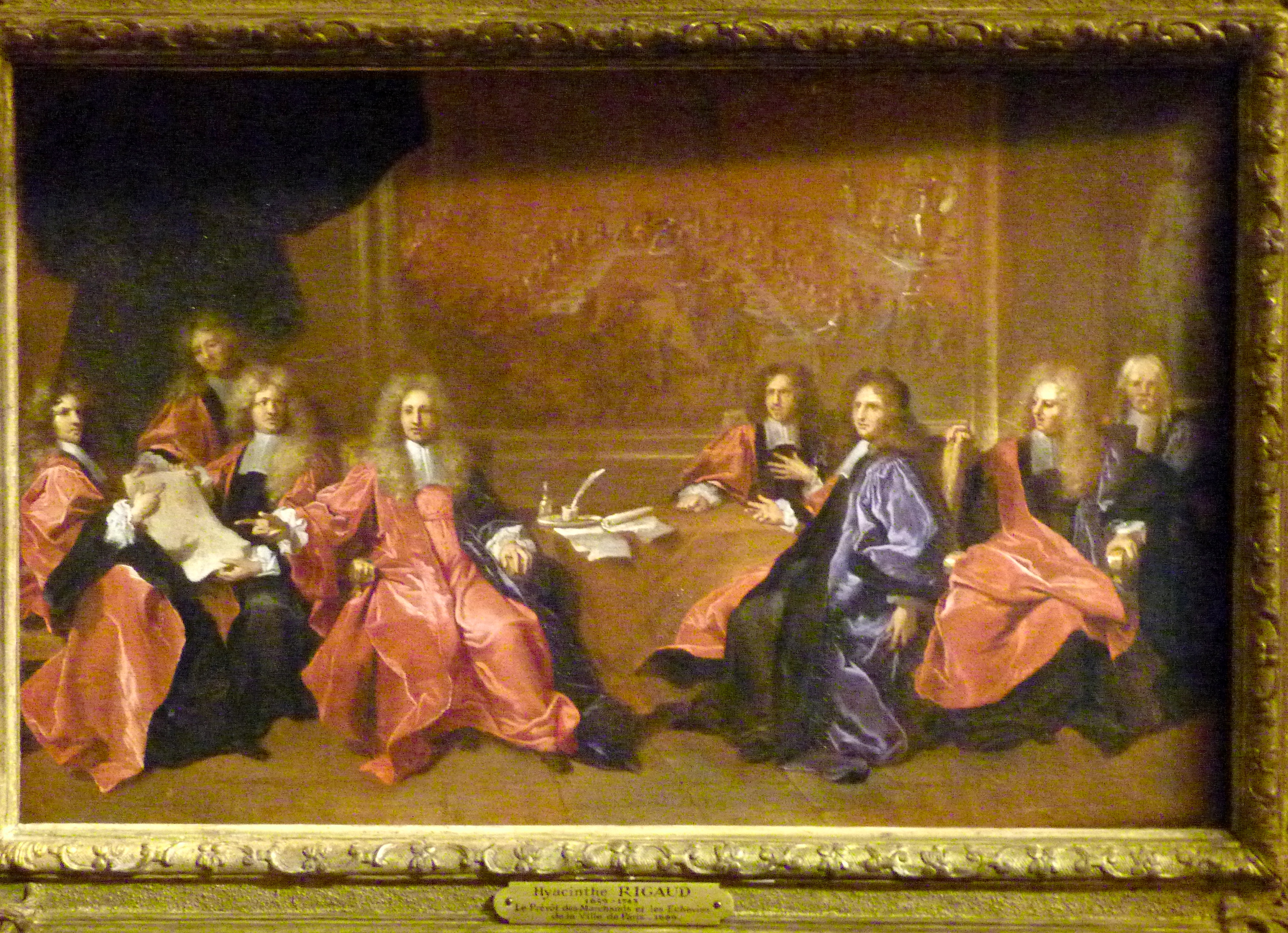 Le Prévôt des marchands et les échevins de la ville de Paris délibérant le 1er avril 1689 de la commémoration du dîner offert au roi Louis XIV à l'Hôtel de ville après sa guérison de 1687 (1689), huile sur toile de Hyacinthe Rigaud. Collection particulière de Georges de Lastic (1927-1988) lors de l'exposition Le cabinet d'un amateur, n°8, au musée de la chasse et de la nature, Paris (décembre 2009-mars 2010).